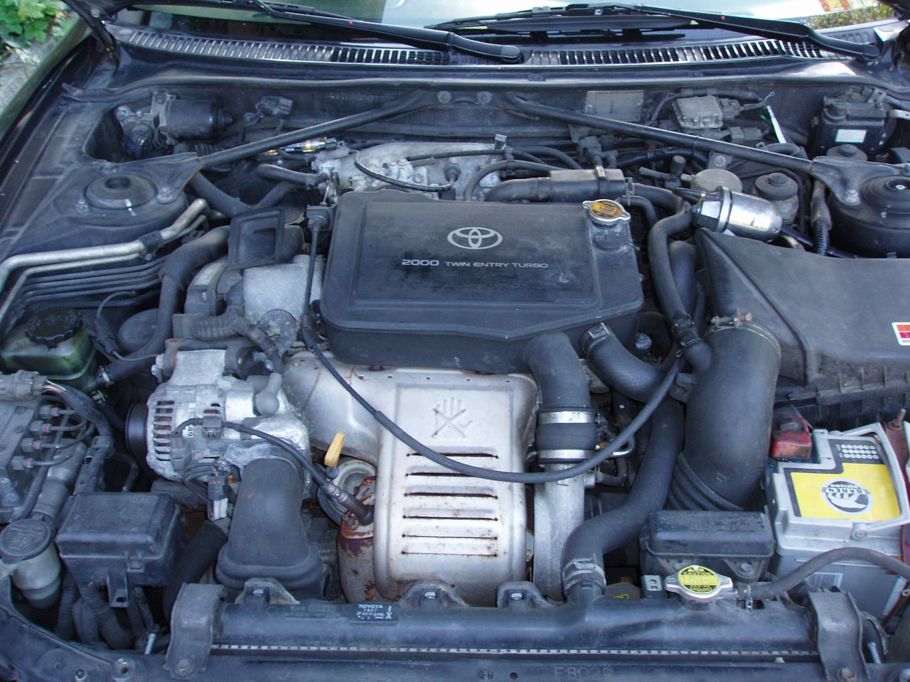 Motorraum einer Celica GT-Four (ST205) mit 3S-GTE Gen3